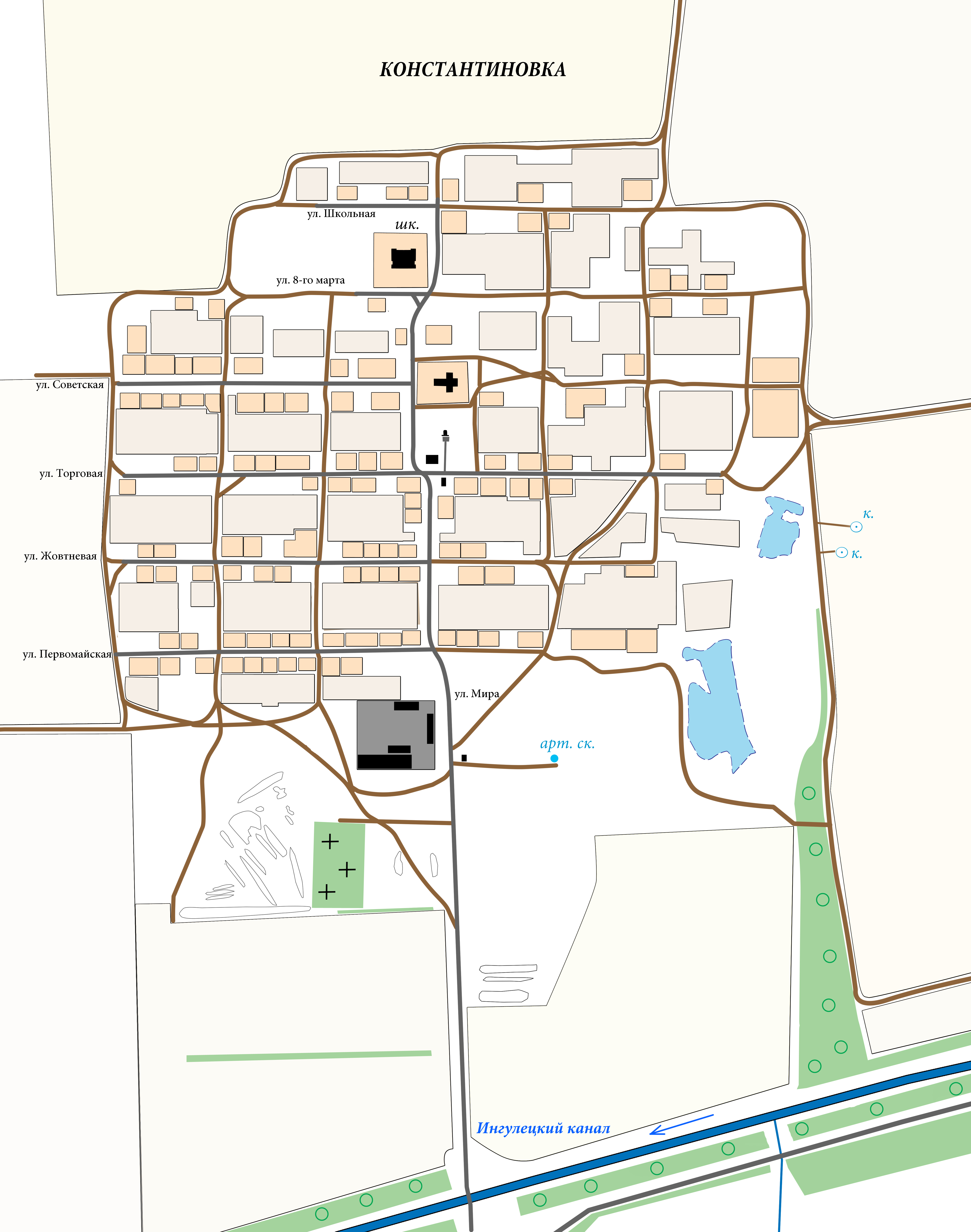 Карта села Константиновка